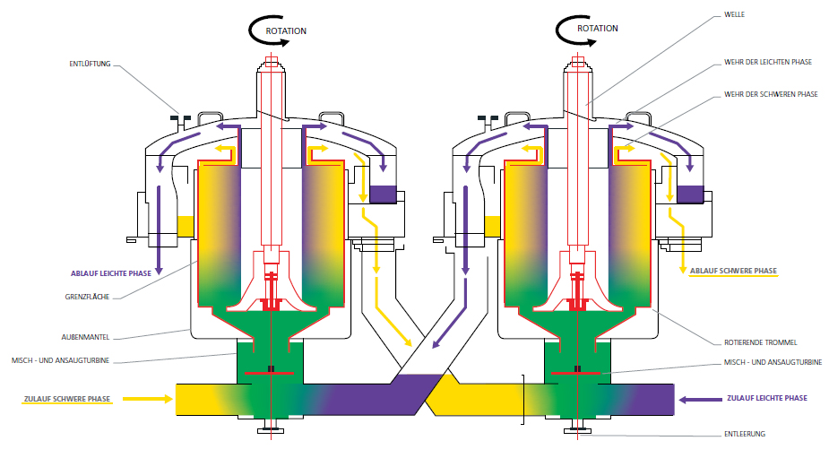 Flüssig-Flüssig-Extraktoren